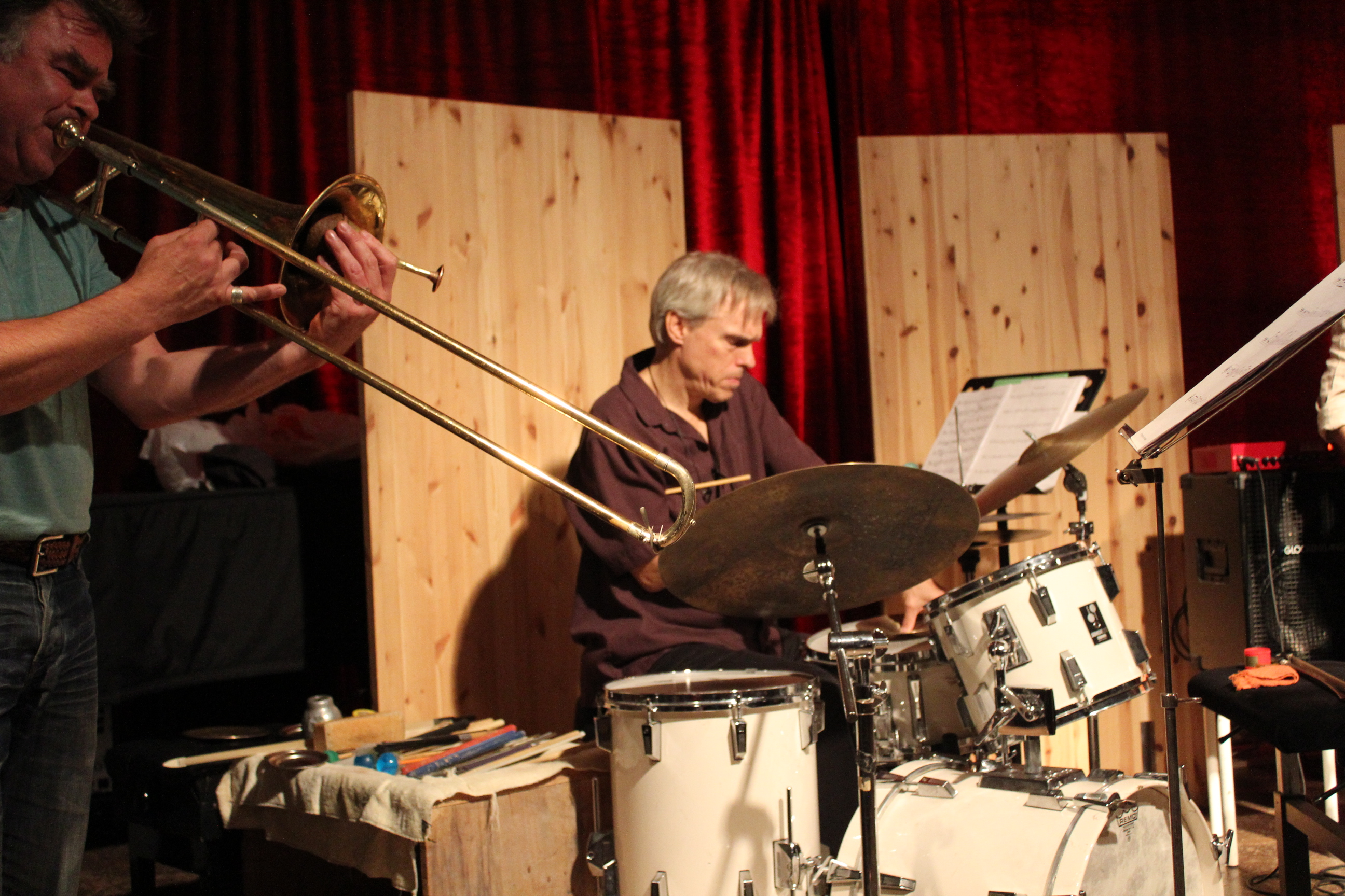 Gerry Hemingway mit Posaunist Wolter Wierbos im Loft (Köln) Oktober 2013